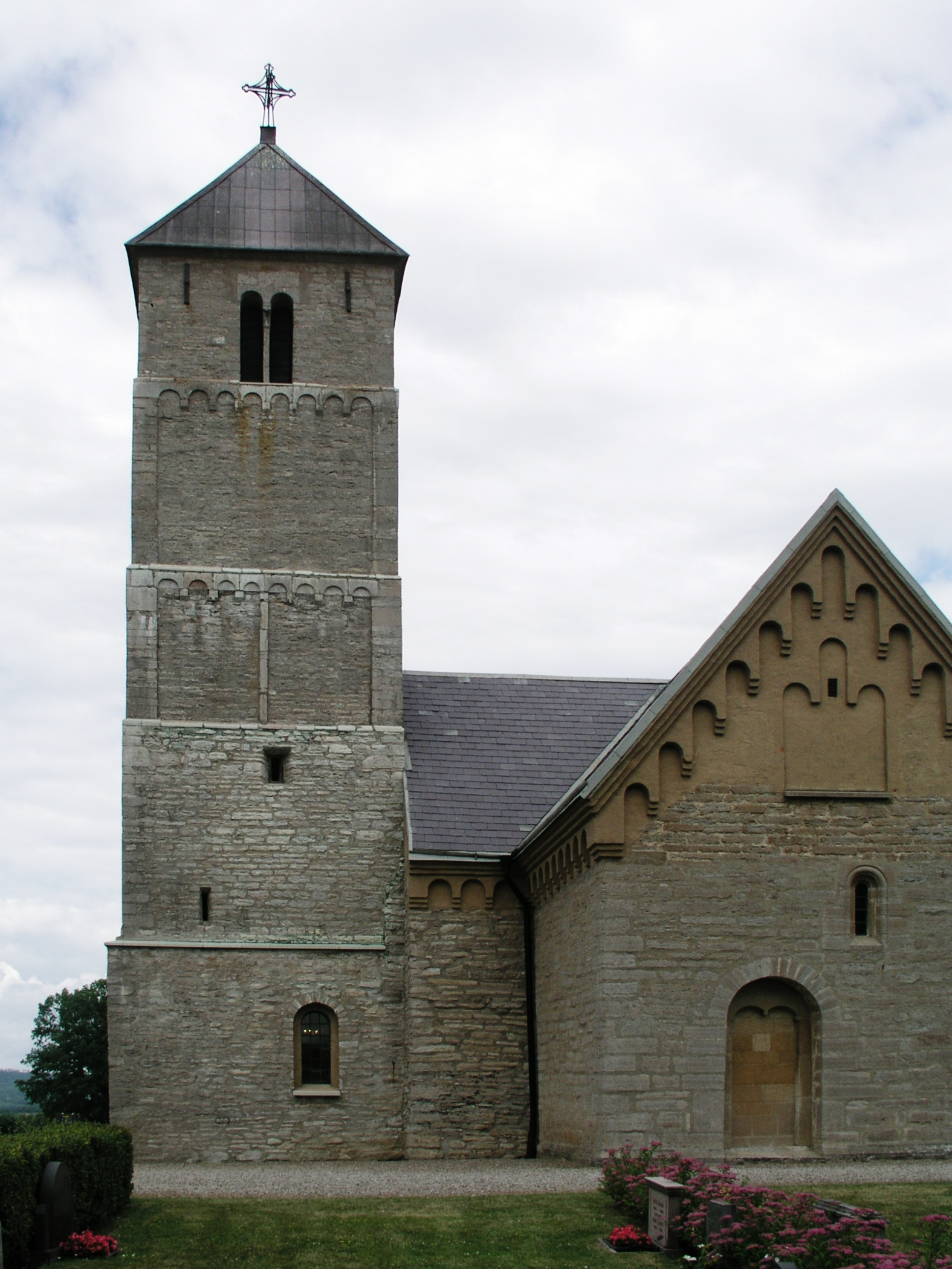 Heda kyrka, Diocese of Linköping, Ödeshögs kommun. Church tower.